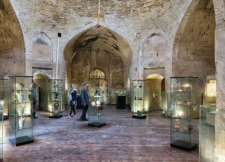 مسجد جامع ساوه - ۱۳۹۶